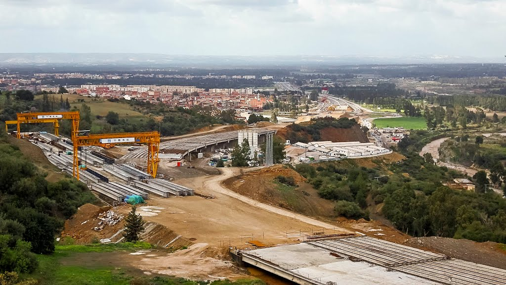 Travaux de l'Autoroute au niveau de Sidi Madani